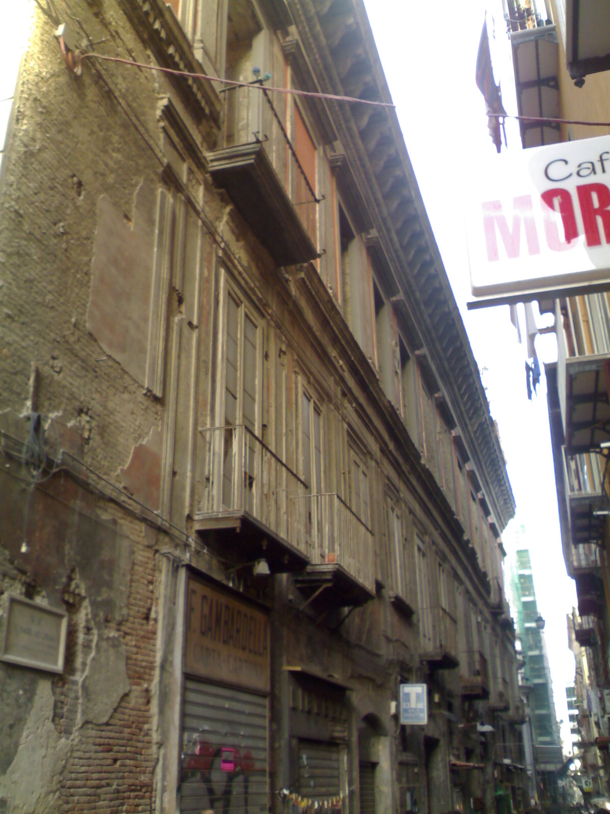 Palazzo Carafa conti di Montorio, nei pressi di piazzetta Nilo (Napoli)